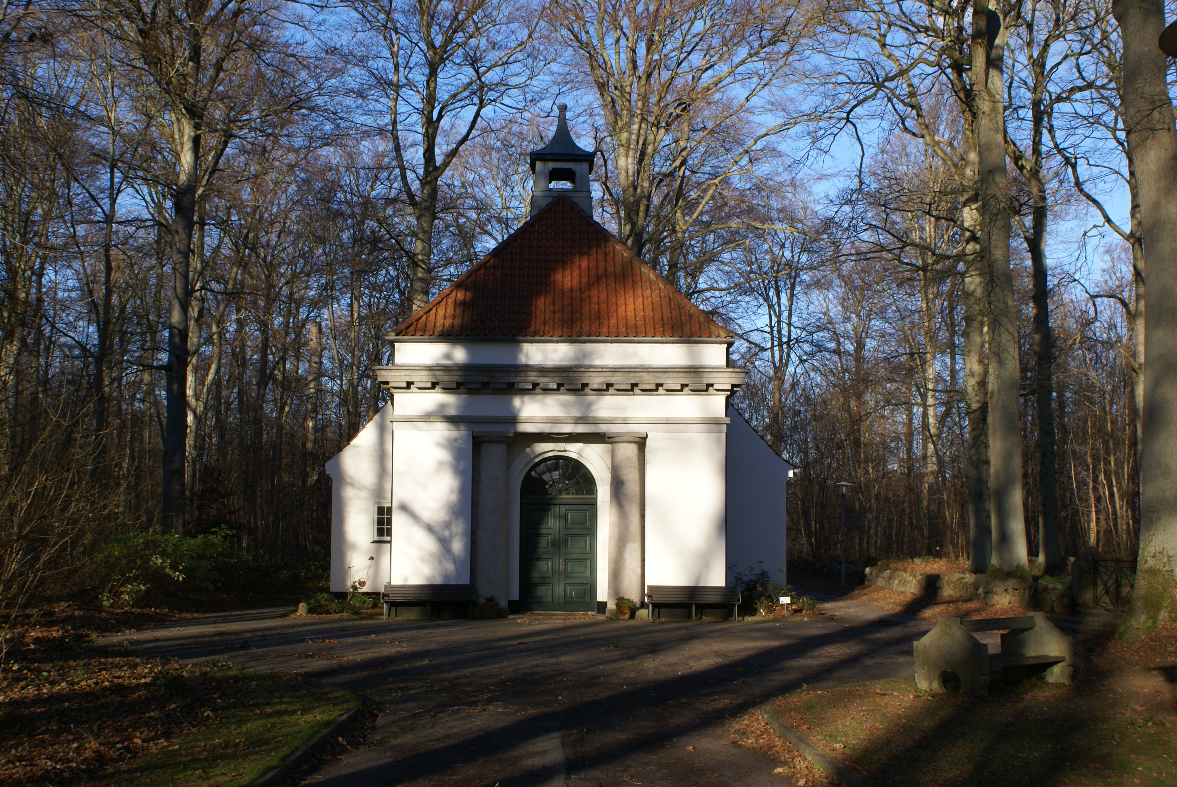 Kapellet på Sindssygehospitalet i Nykøbing på Sjælland